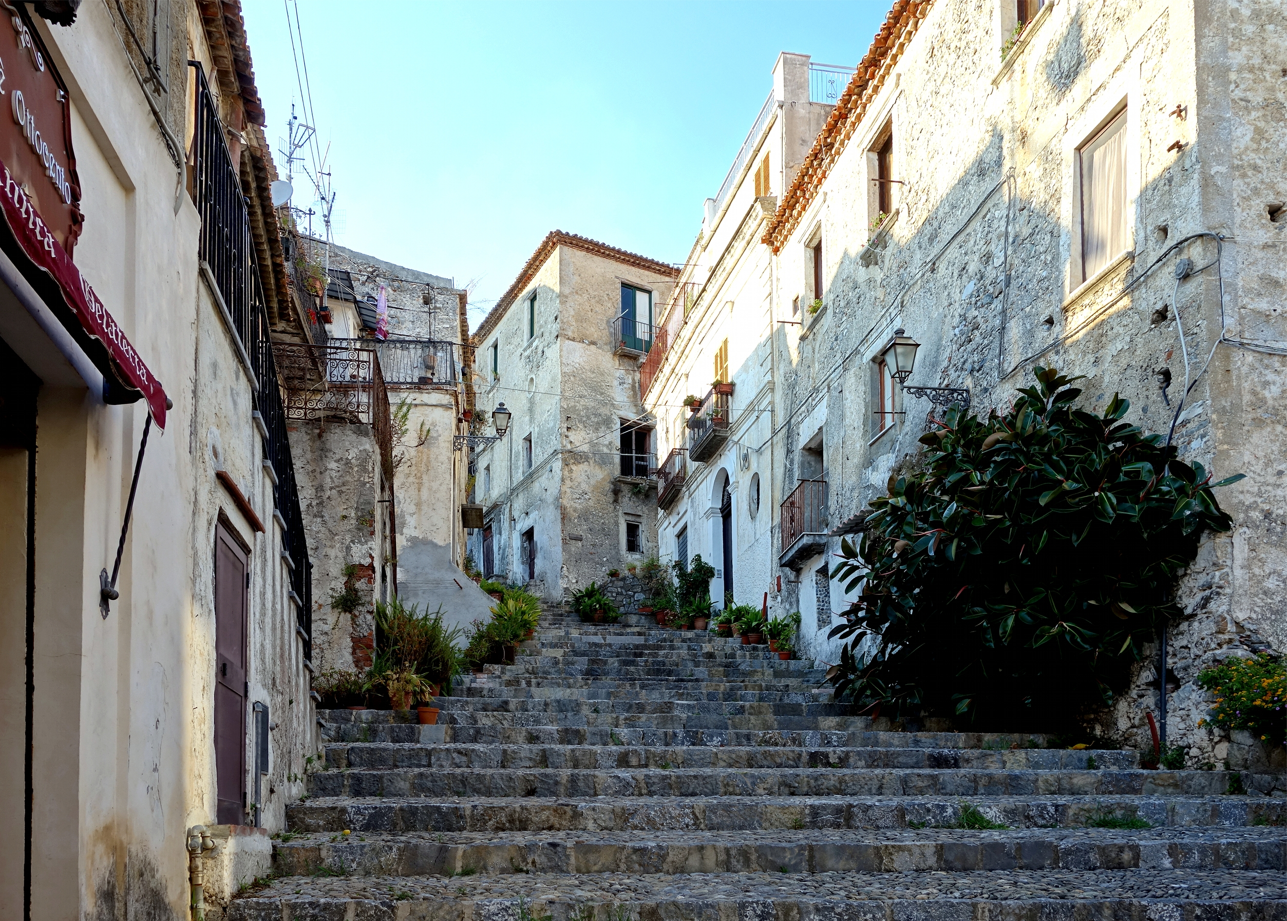 Escalier à Scalea (Calabre).